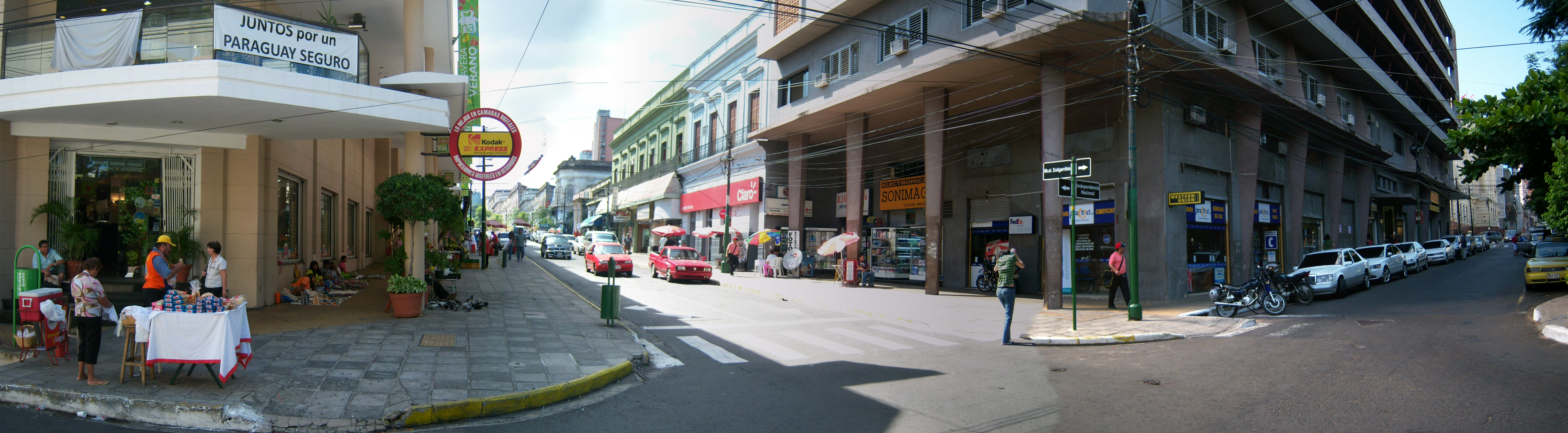 Calle Palma en Asunción.